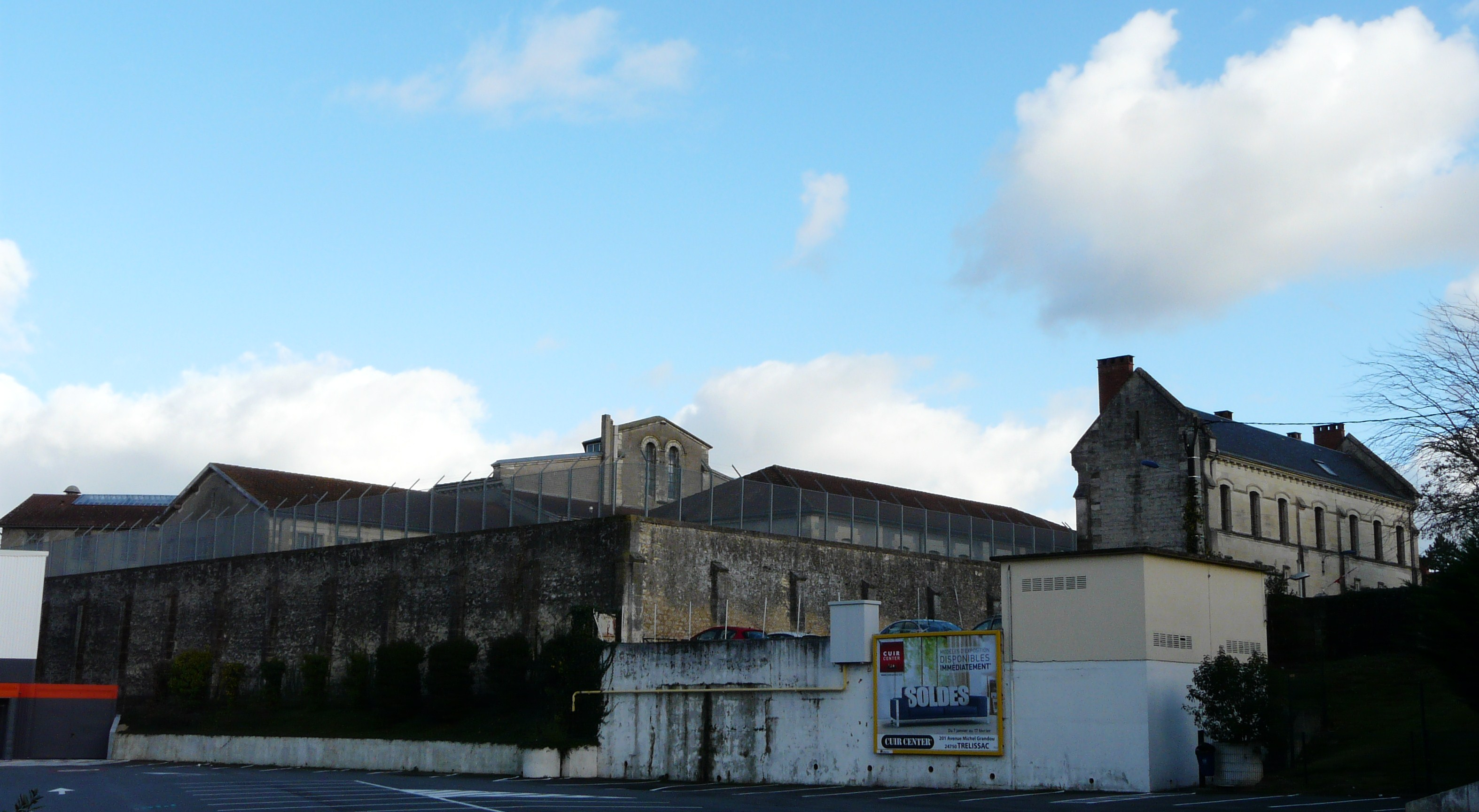 Les bâtiments de la maison d'arrêt de Périgueux, Dordogne, France.